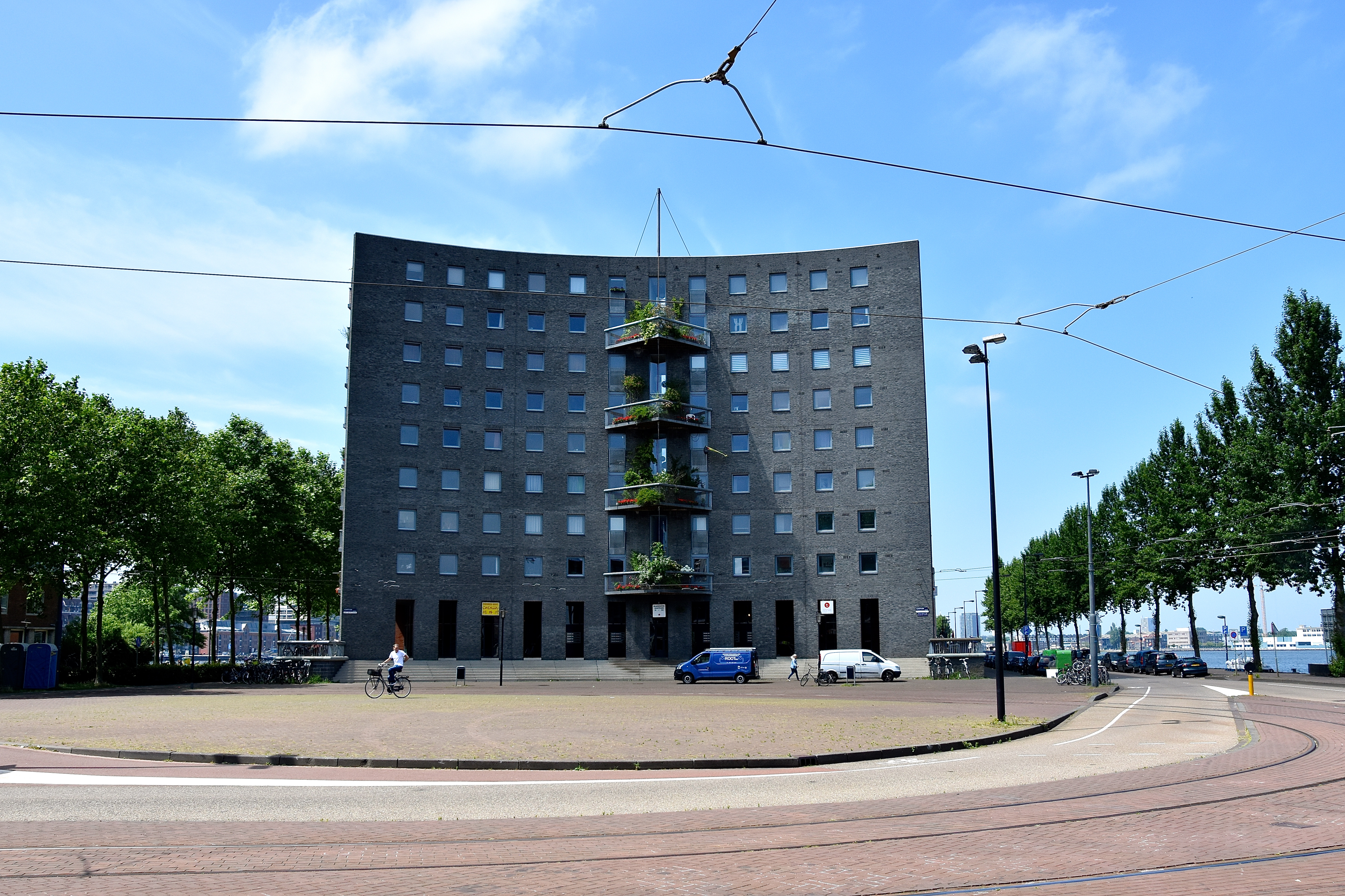 Woongebouw uit 1995 ontworpen door de Belgische architect Jo Crepain (1950-2008).